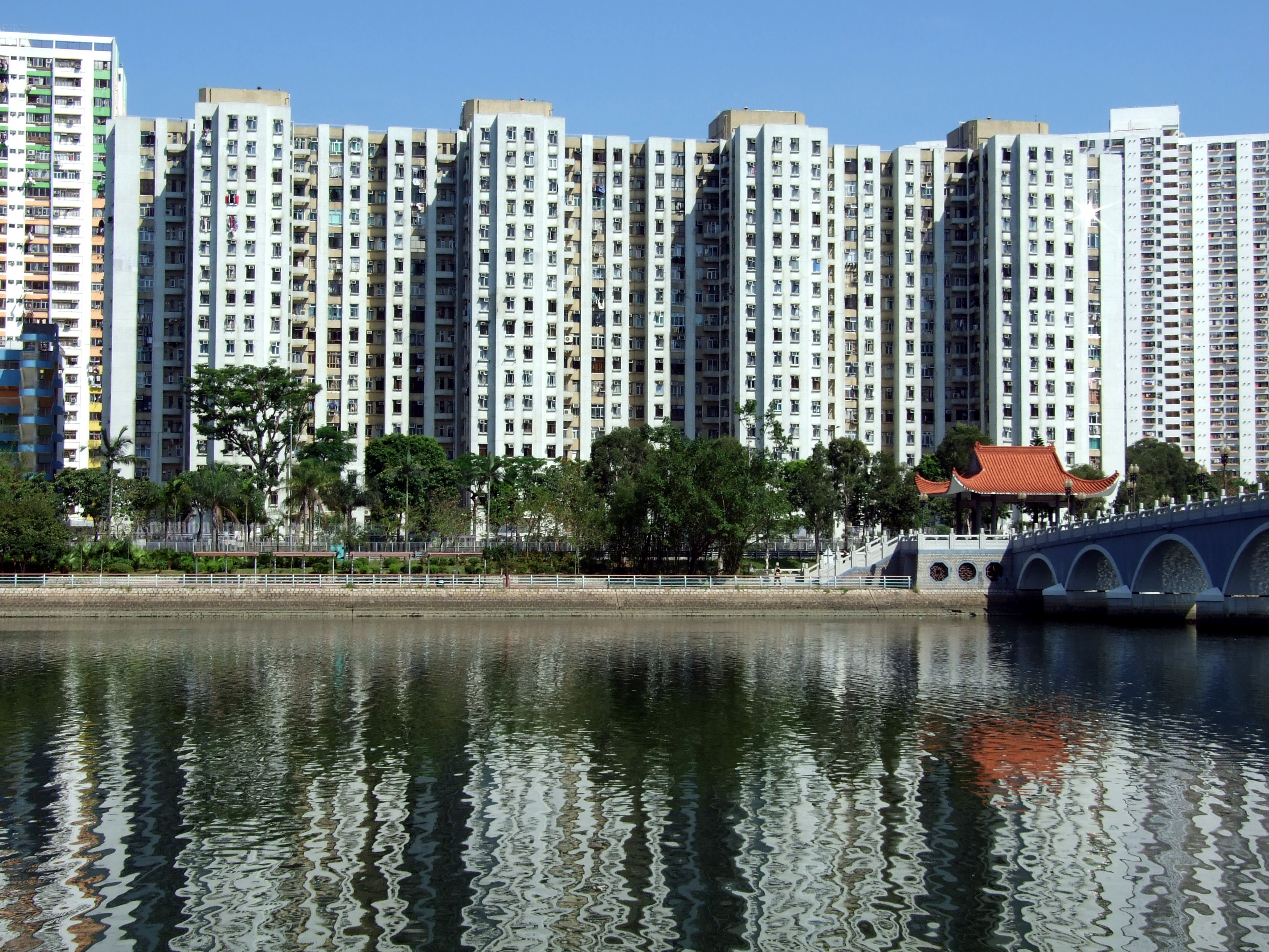 中文（香港）: 愉城苑